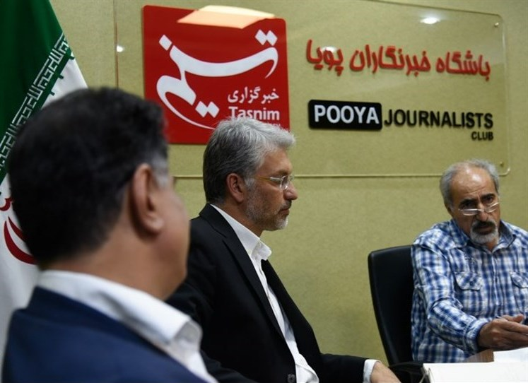 هومن جوکار در نشست حفاظت از «یوزپلنگ آسیایی» در باشگاه خبرنگاران تسنیم